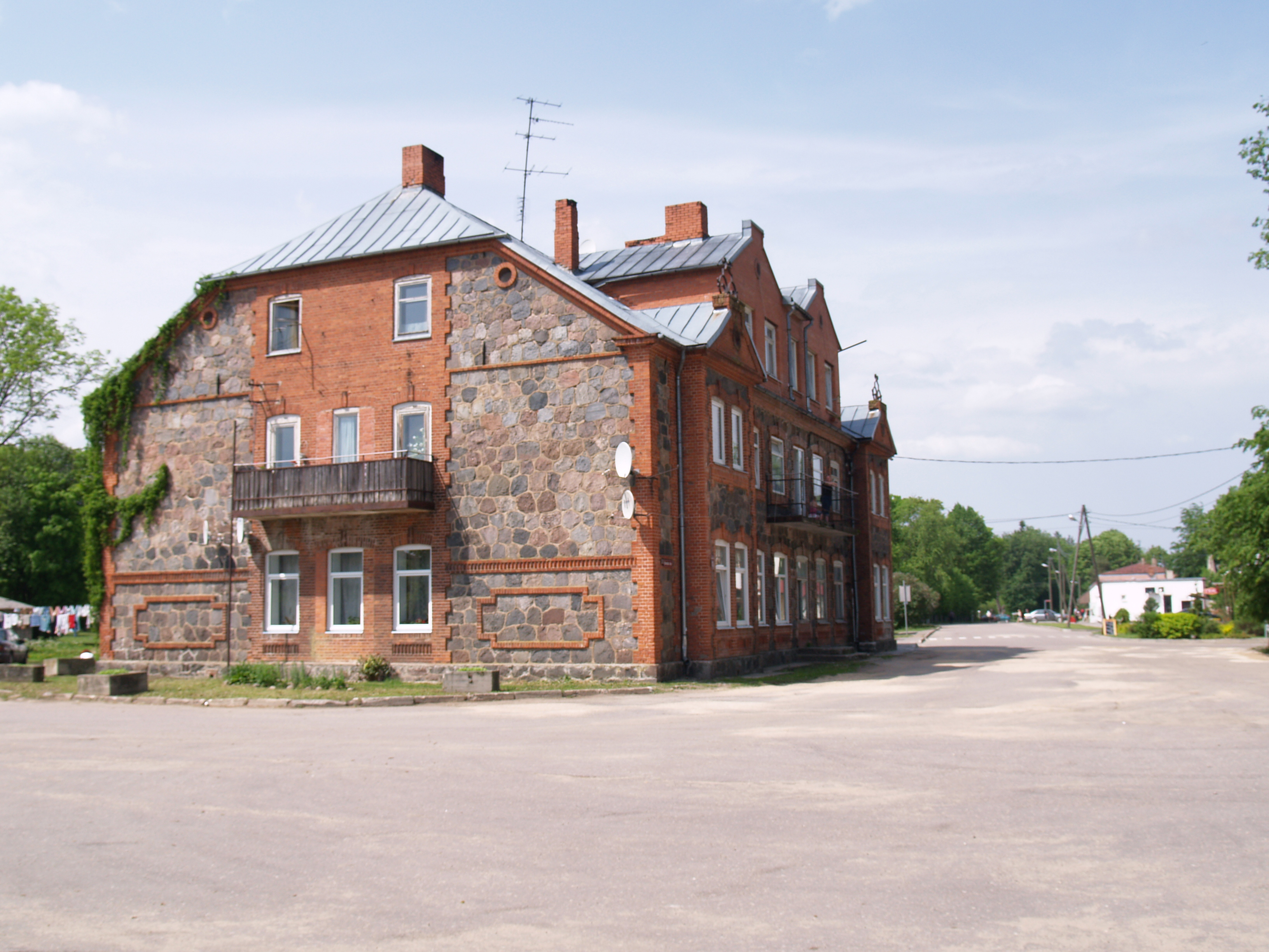 Inčukalns